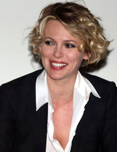 Barbora Bobulova - Foto di G. M. Ireneo Alessi (Sinix)